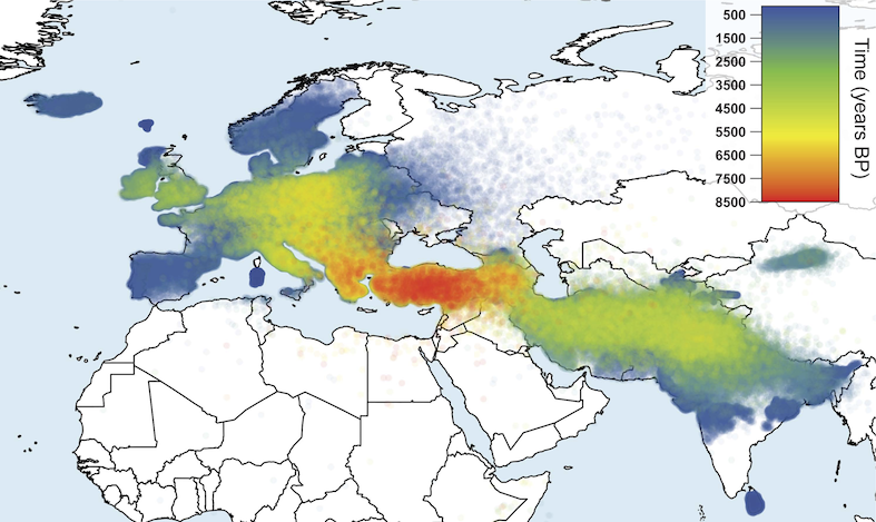 According to the research presented in the article supervised by Atkinson & Gray. See their website